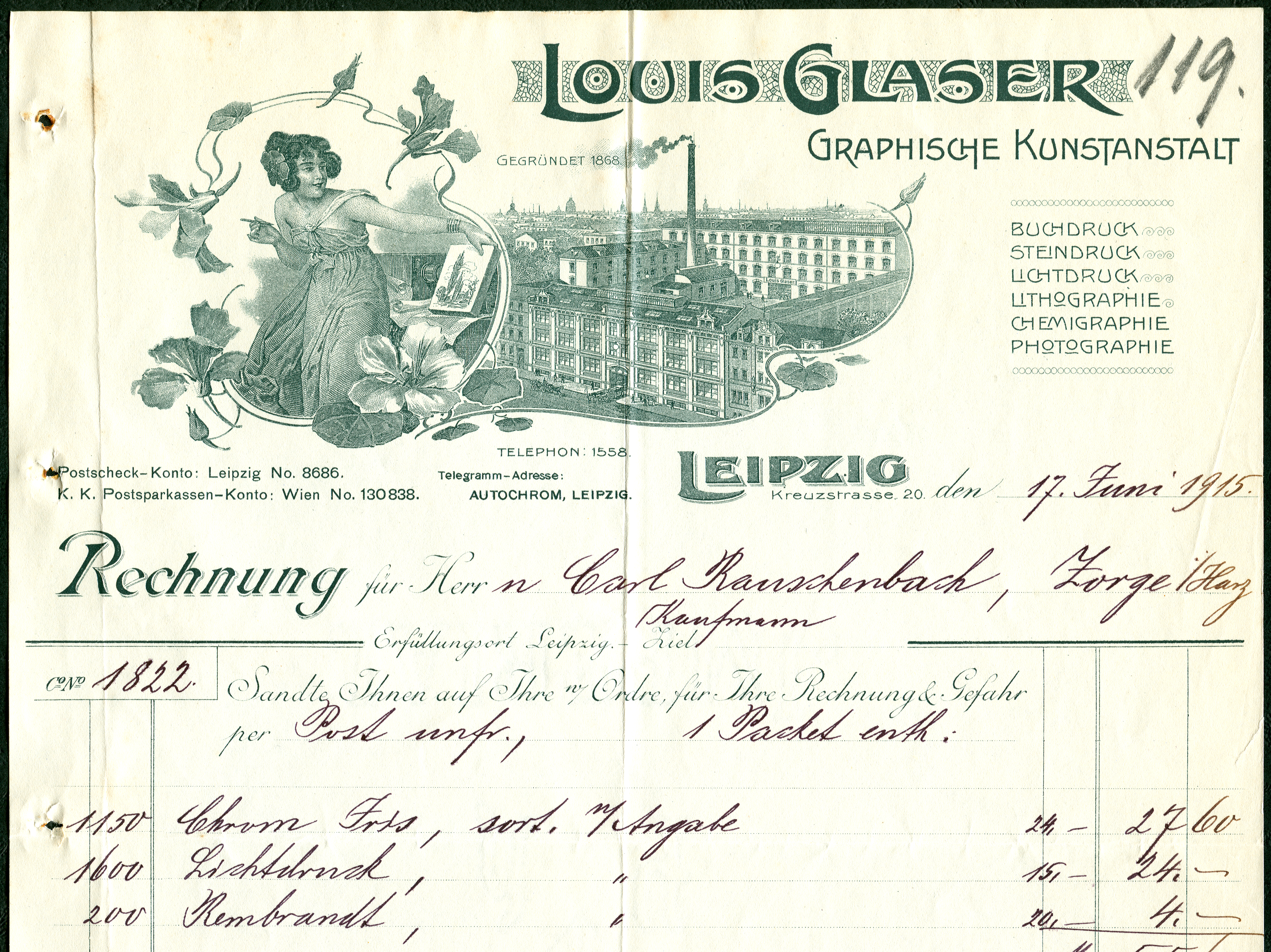 Aufwendig gestalteter Rechnungskopf Graphische Kunstanstalt Louis Glaser um 1910, während des Ersten Weltkrieges handschriftlich datiert 17. Juni 1915. Zu sehen ist links eine von floralen Motiven umrankte, leicht bekleidete Muse mit Zeichenstift und Zeichenblock, dahinter ein hölzerner Fotoaparat. Rechts davon die Fabrikationsgebäude des Unternehmens Louis Glaser aus der Vogelperspektive, im Hintergrund die Silhouette der Stadt Leipzig. Die Firma, gegründet 1868, betrieb ihre Anstalt für Buchdruck, Steindruck, Lichtdruck, Lithographie, Chemigraphie und Photographie um 1900 in der Leipziger Kreuzstraße 20, ihre Telegramm-Adresse lautete "Autochrom, Leipzig". Dieser Rechnungsvordruck trägt am Fuß den vorgedruckten Hinweis "Leere Kisten werden bei frachtfreier Rücksendung zu 2/3 des berechneten Wertes gutgeschrieben und war im Paket an den Kaufmann Carl Rauschenbach in Zorge adressiert. Er hatte 1150 Chromdrucke, 1.600 Lichtdrucke (vermutlich Ansichtskarten) und "200 Rembrandt" insgesamt 55,60 Mark zu zahlen. Das Blatt, etwas größer als DIN A4, trägt ein Wasserzeichen der Papiermarke Imperial, über dem ein gespannter Bogen mit Pfeil zu sehen ist zwischen den Buchstaben "P" (?) und h.